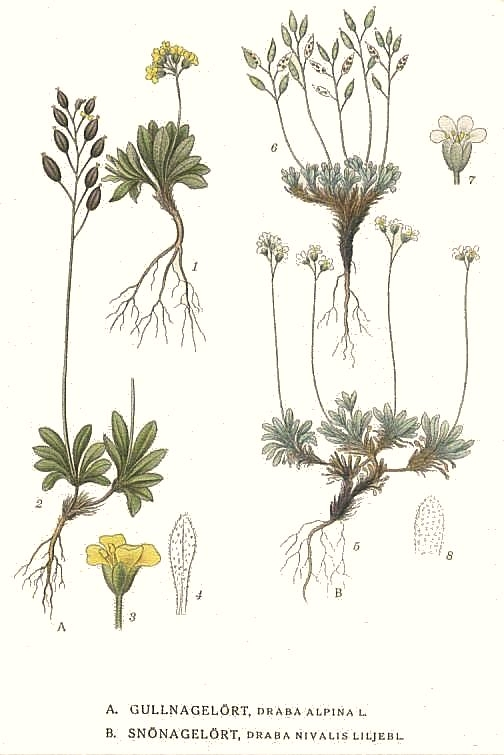 Original Description A. Gullnagelört, Draba alpina L. B. Snönagelört, Draba nivalis Liljebl.